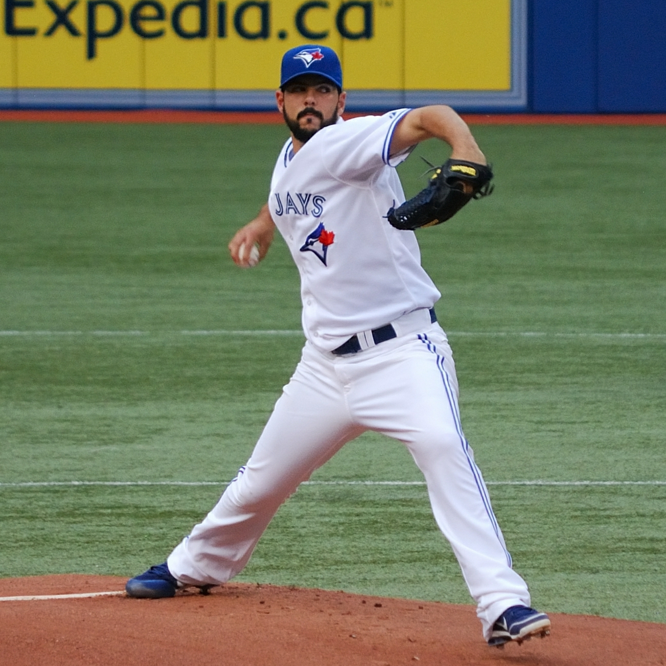 Carlos Villanueva